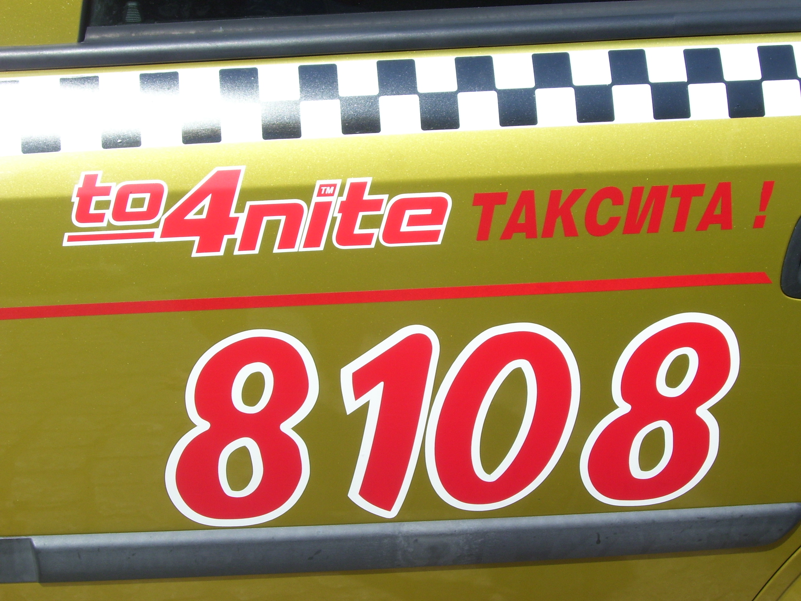 Име на таксиметрова компания на шльковица.